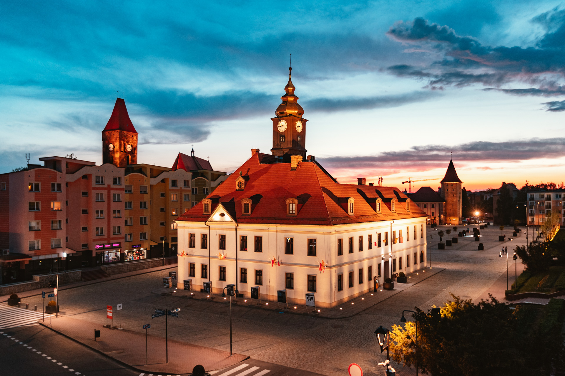 Ratusz w Lubinie, siedziba Muzeum.